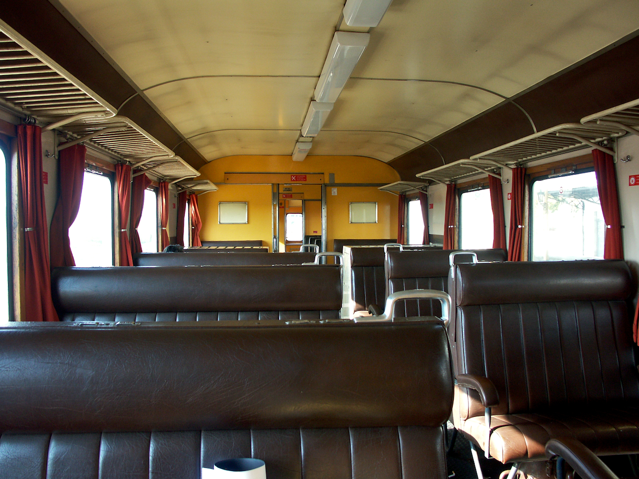 Tipo: Comboio Regional 4802 [Funcheira - Casa Branca] Local: Estação de Casa Branca [Linha do Alentejo, PK 90] Data e hora: 4 de Dezembro de 2004 [12h47] Material: Automotora 0113 [Unidade Simples Diesel - Nohab] pormenor do interior (2ª classe). vídeo desta viagem aqui.